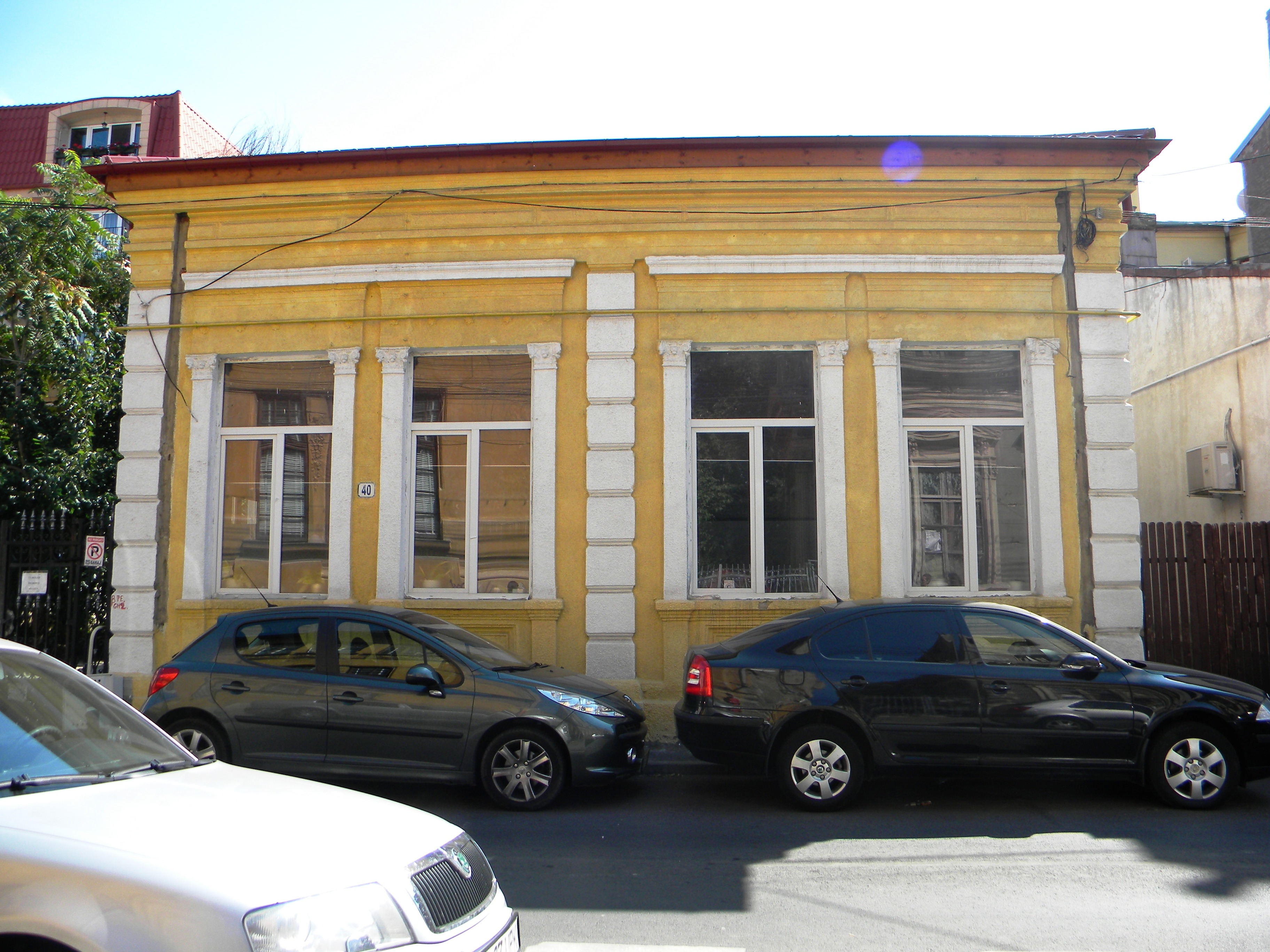 Bucuresti, Romania, Casa pe Strada Frumoasa nr. 40, sect. 1